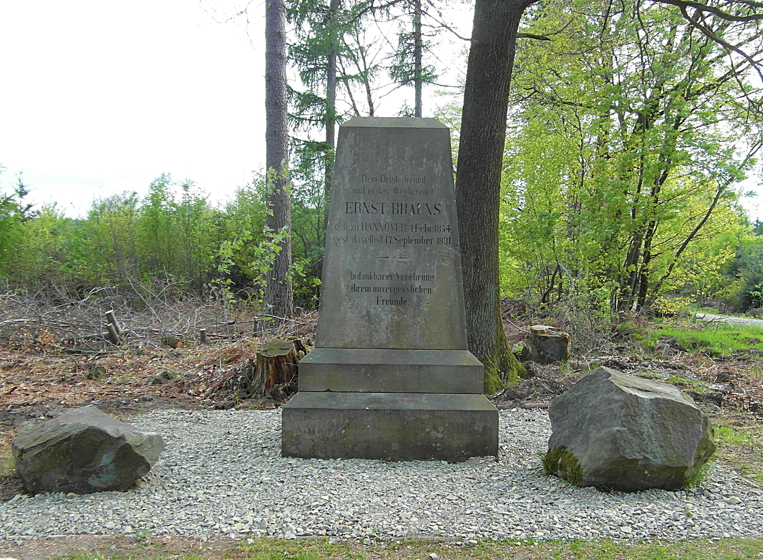 Das als Baudenkmal geschützte Denkmal für Ernst Brauns im Deister bei Barsinghausen nach der Sanierung im Frühjahr 2017